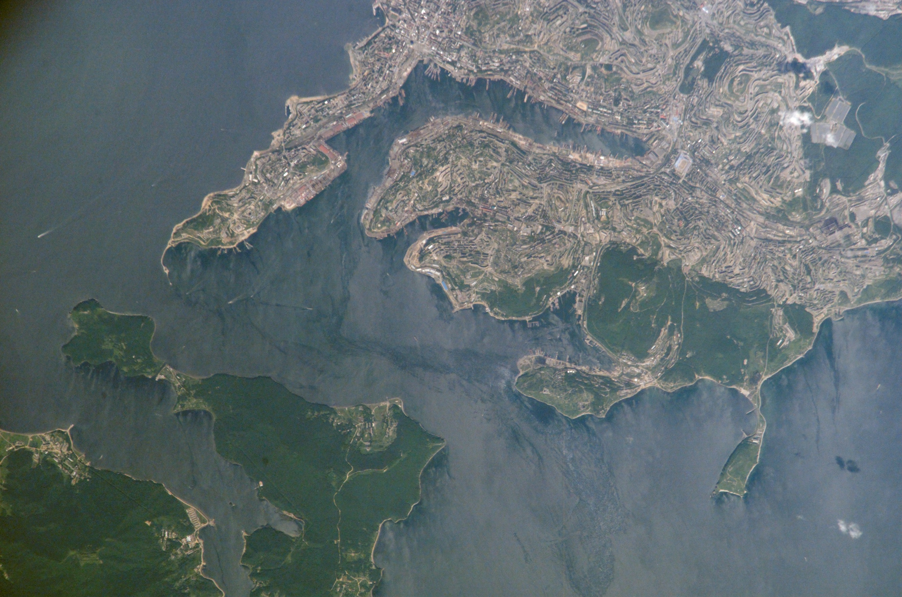 Снимка на пролива Източен Босфор от Международната космическа станция. Изглед от югоизток, горе в центъра е заливът Златен рог и южните части на Владивосток, в горния ляв ъгъл се вижда част от Амурския залив.